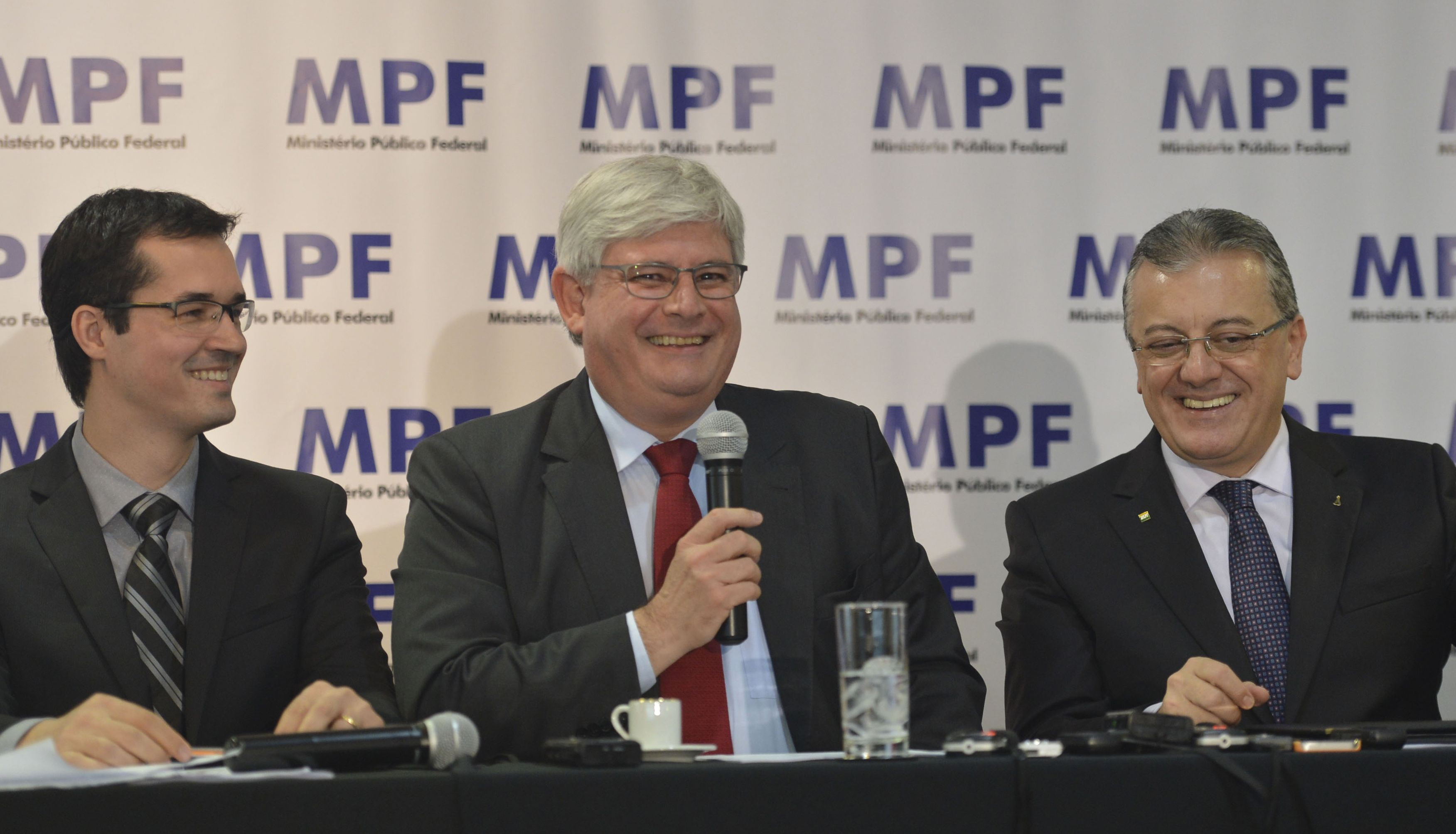 Deltan Dallagnol, coordenador da Operação, o procurador Rodrigo Janot e Aldemir Bendine, da Petrobras na cerimônia de devolução a Petrobras de valores recuperados pela Operação Lava Jato.